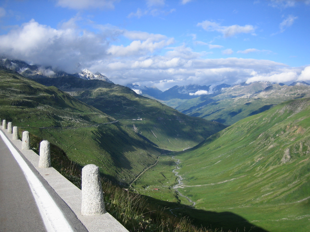 Blick vom Furkapass nach Osten ins Tal der Furkareuss